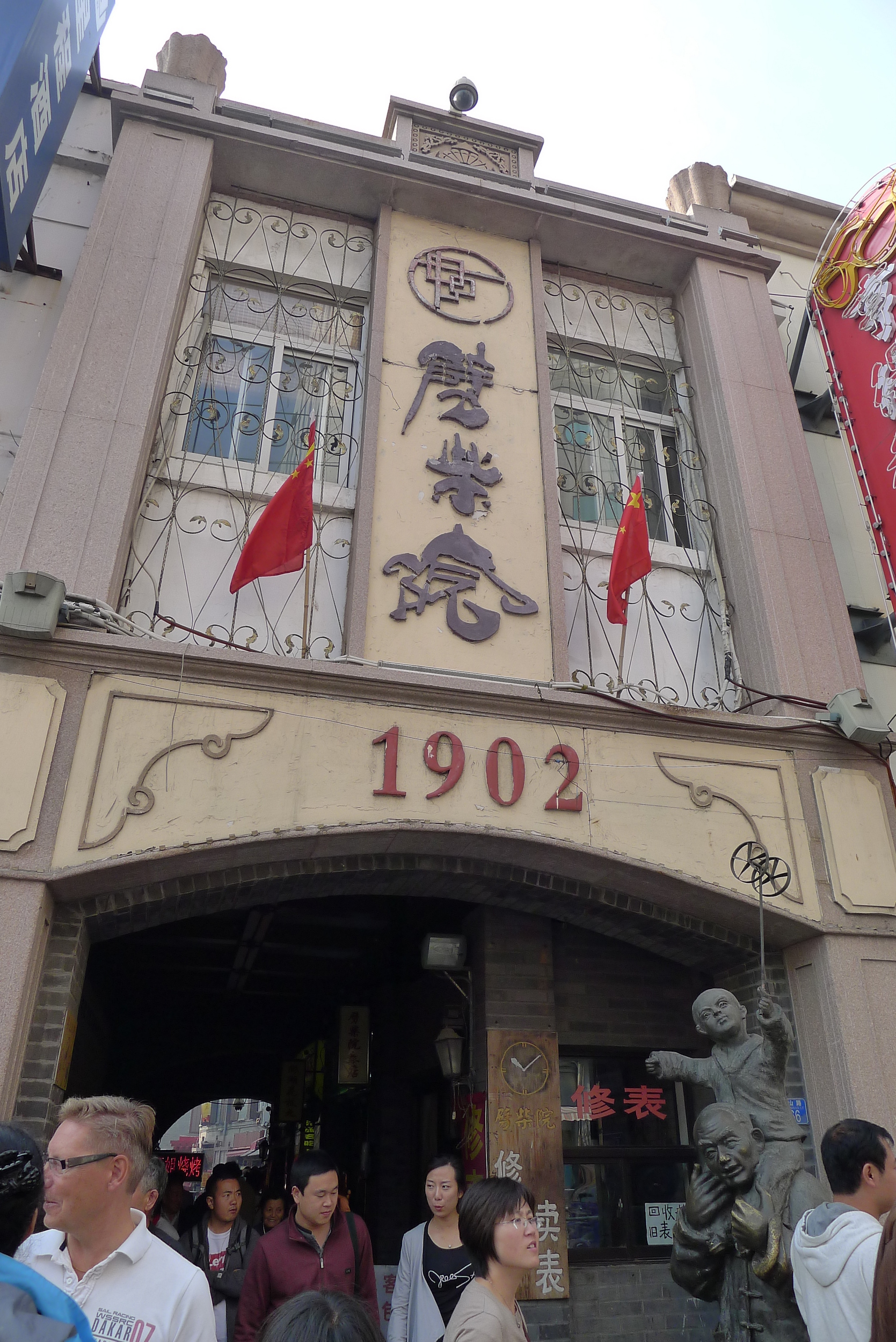 青岛劈柴院